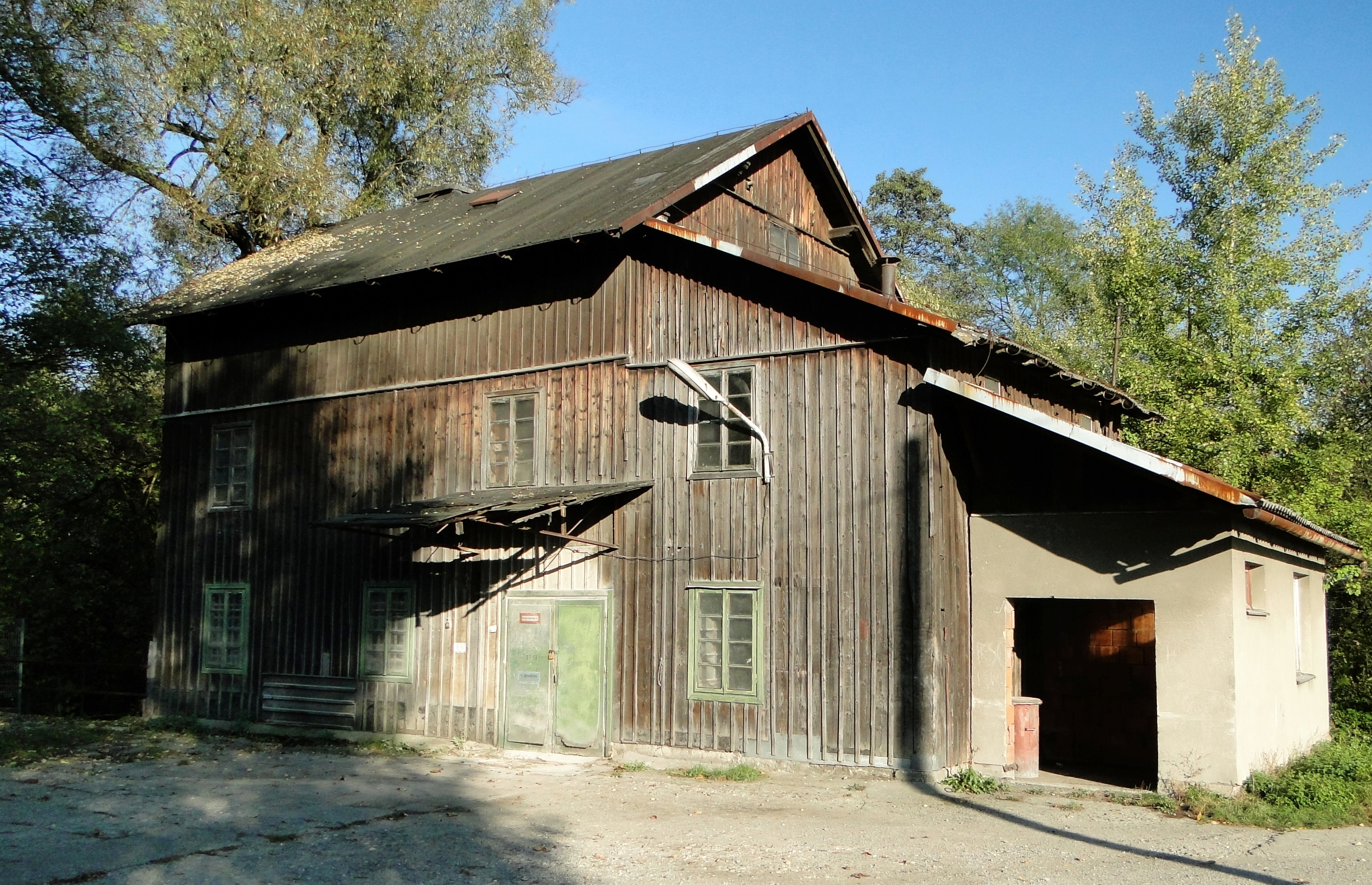 Zabytkowy młyn wodny w Młodziejowicach